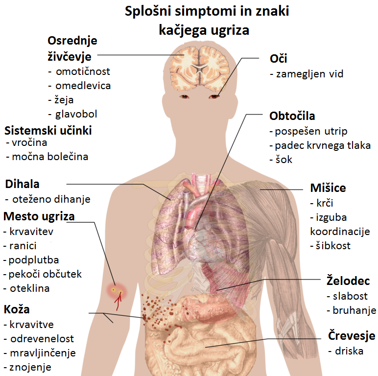 Splošni simptomi in znaki kačjega ugriza